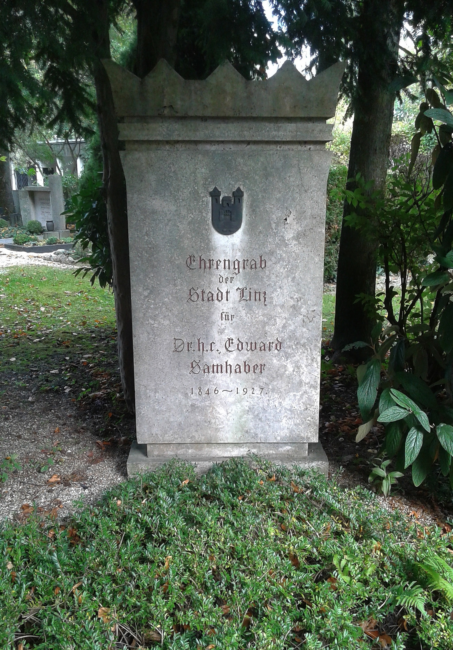 St. Barbara-Friedhof Linz - Grab Eduard Samhaber